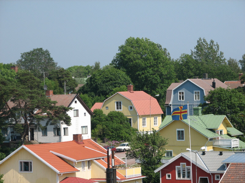 Mariehamn, capitale des îles Aland (entre la Finlande et la Suède) [juillet 2006 / photographe : MetallYZA]